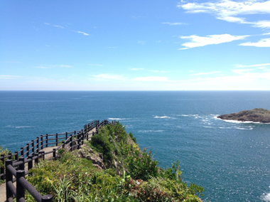 馬ヶ背 馬の背の様な波打った岩肌の上を歩くことが出来る